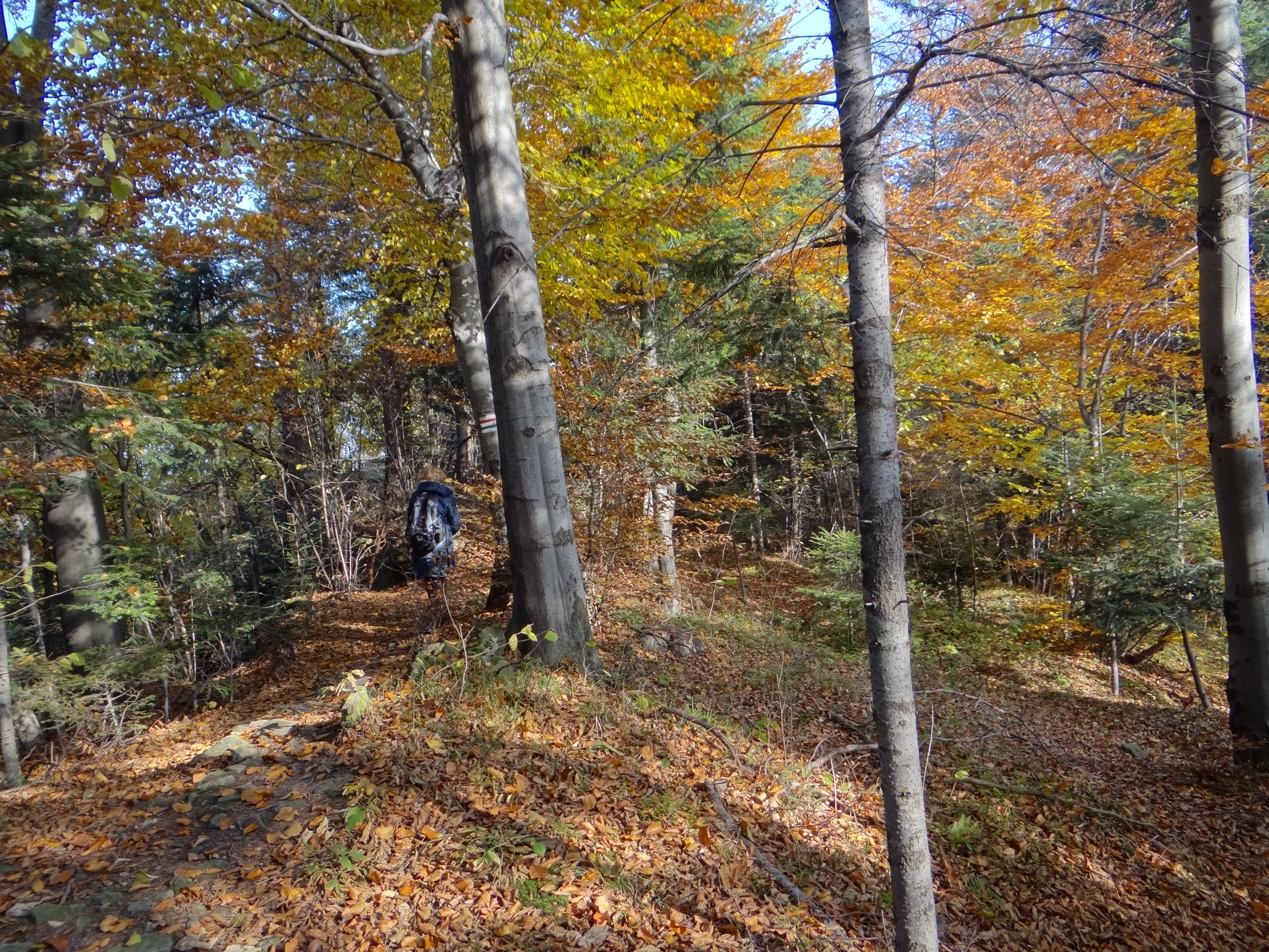 Żurawnica